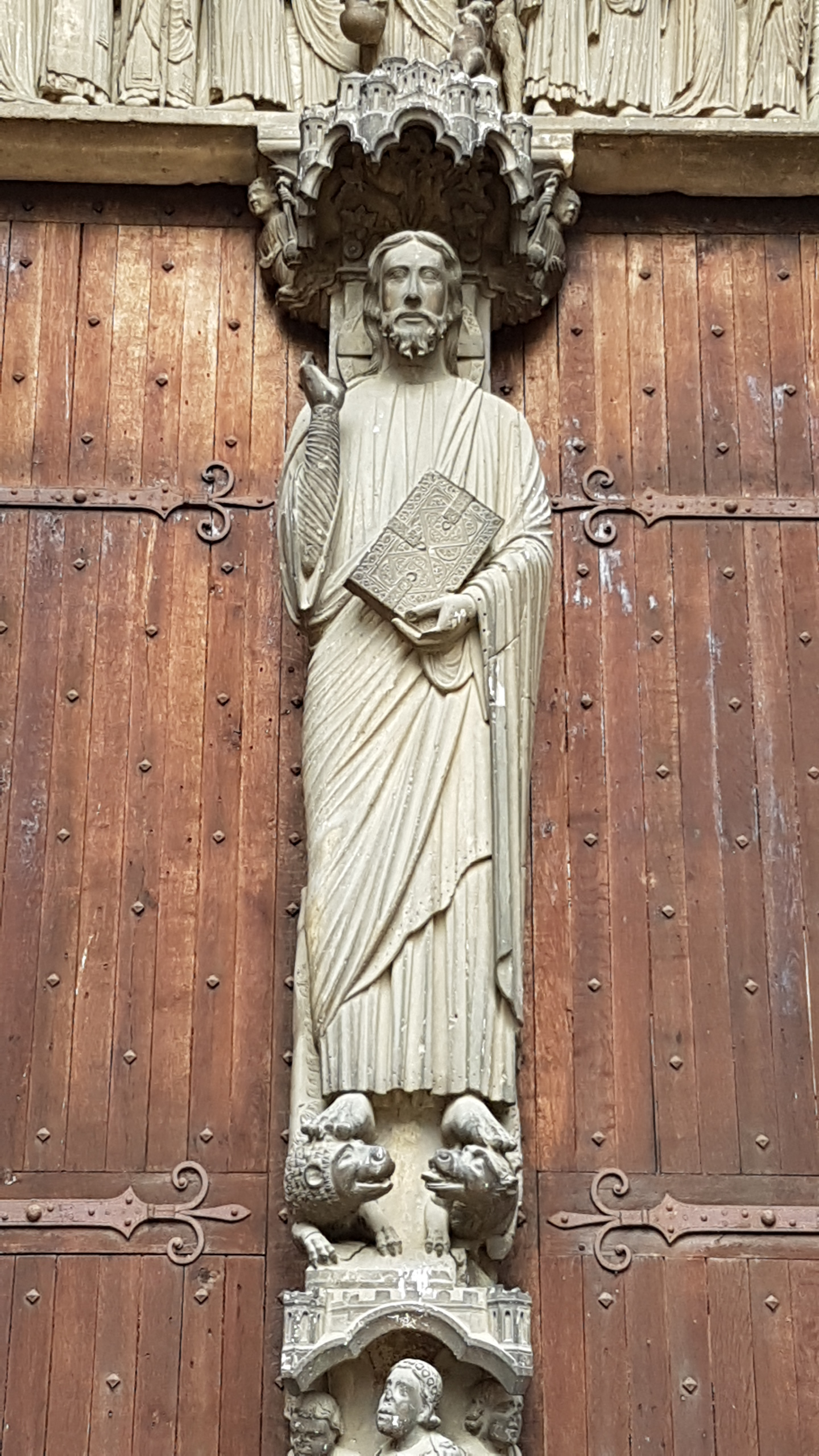 Le Christ dans la baie centrale du portail Sud de la cathédrale de Chartres.